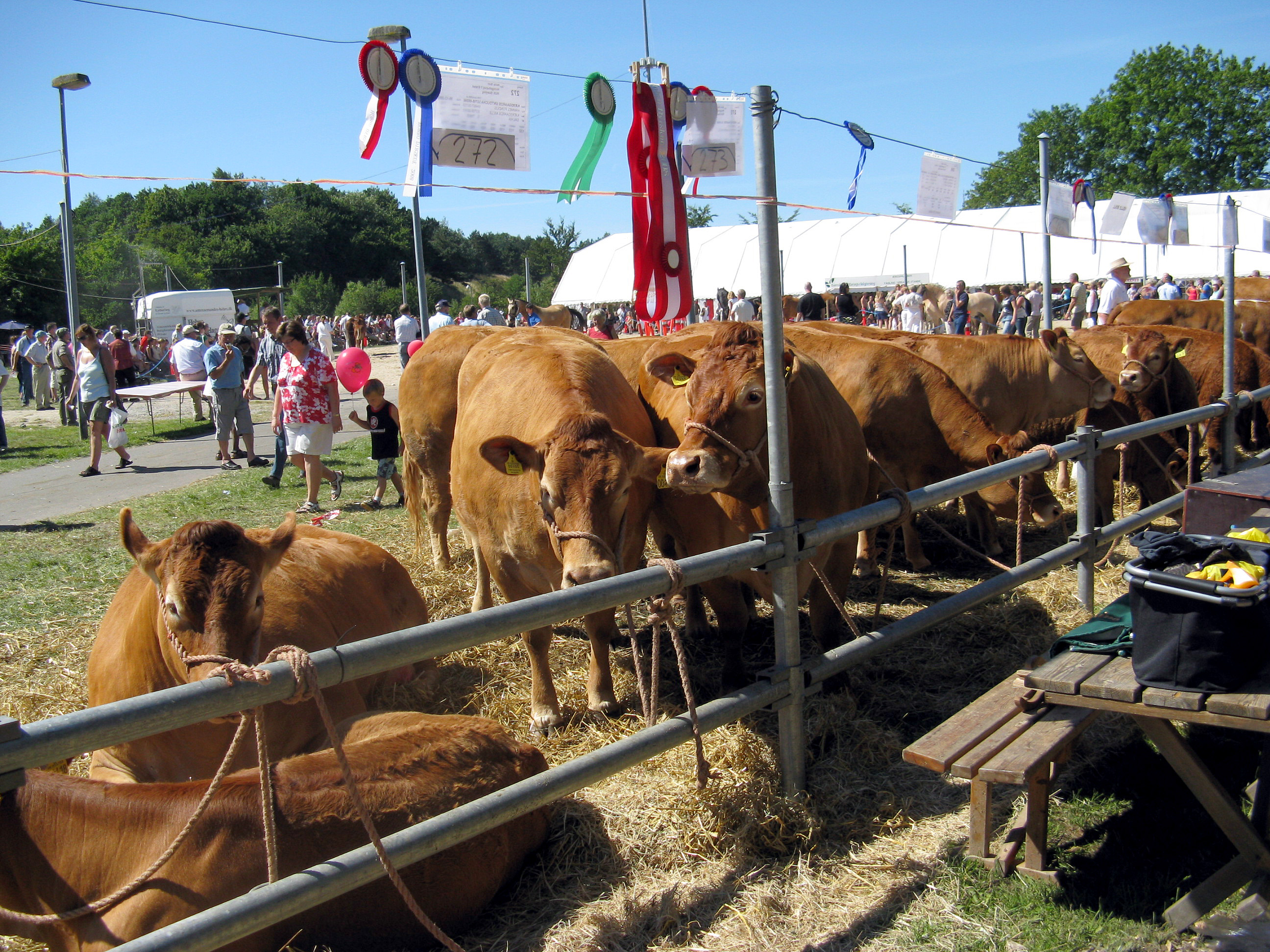 Dyrskue i Hobro, Jylland, Denmark.